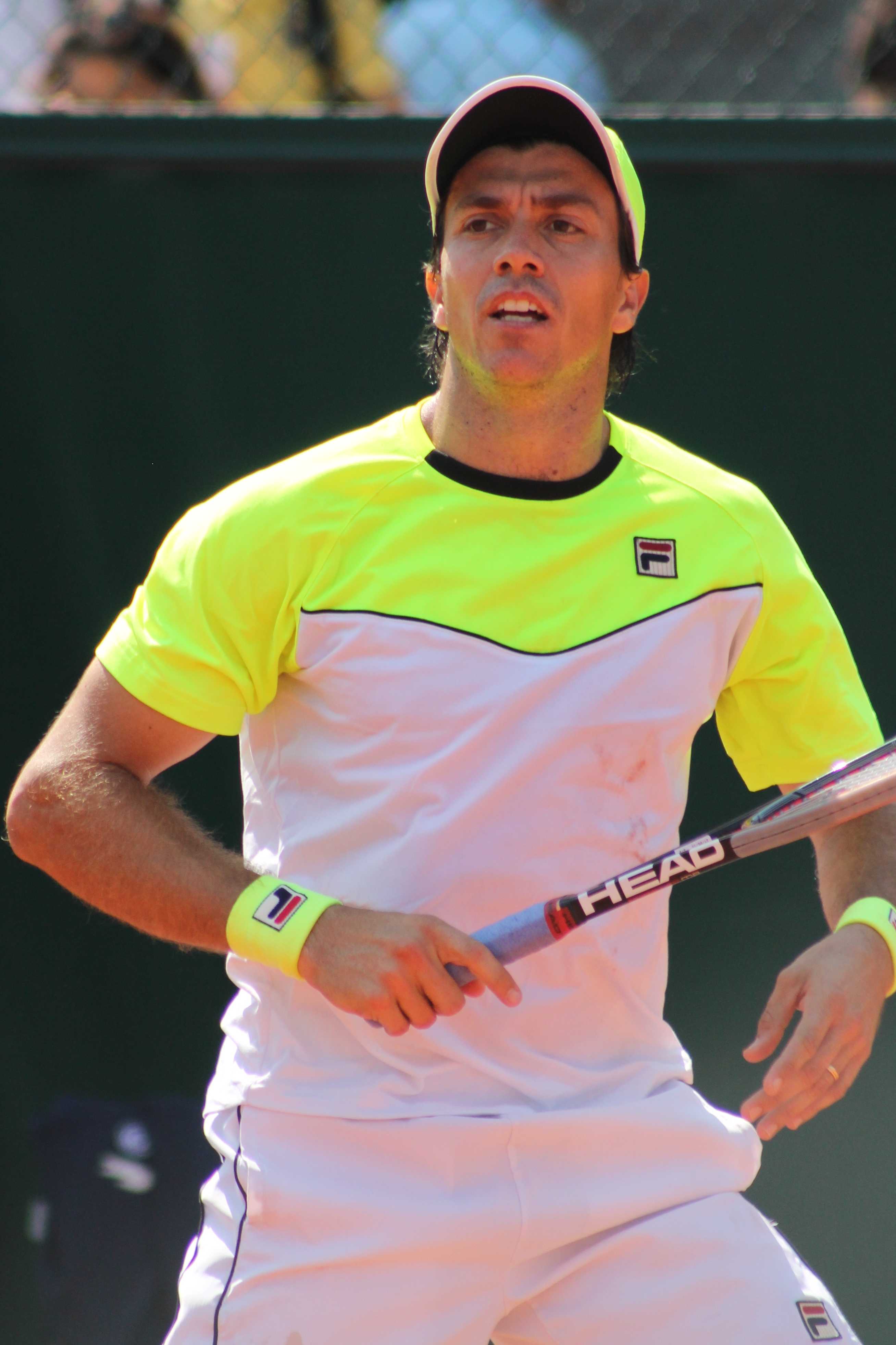 Berlocq RG15 (10)